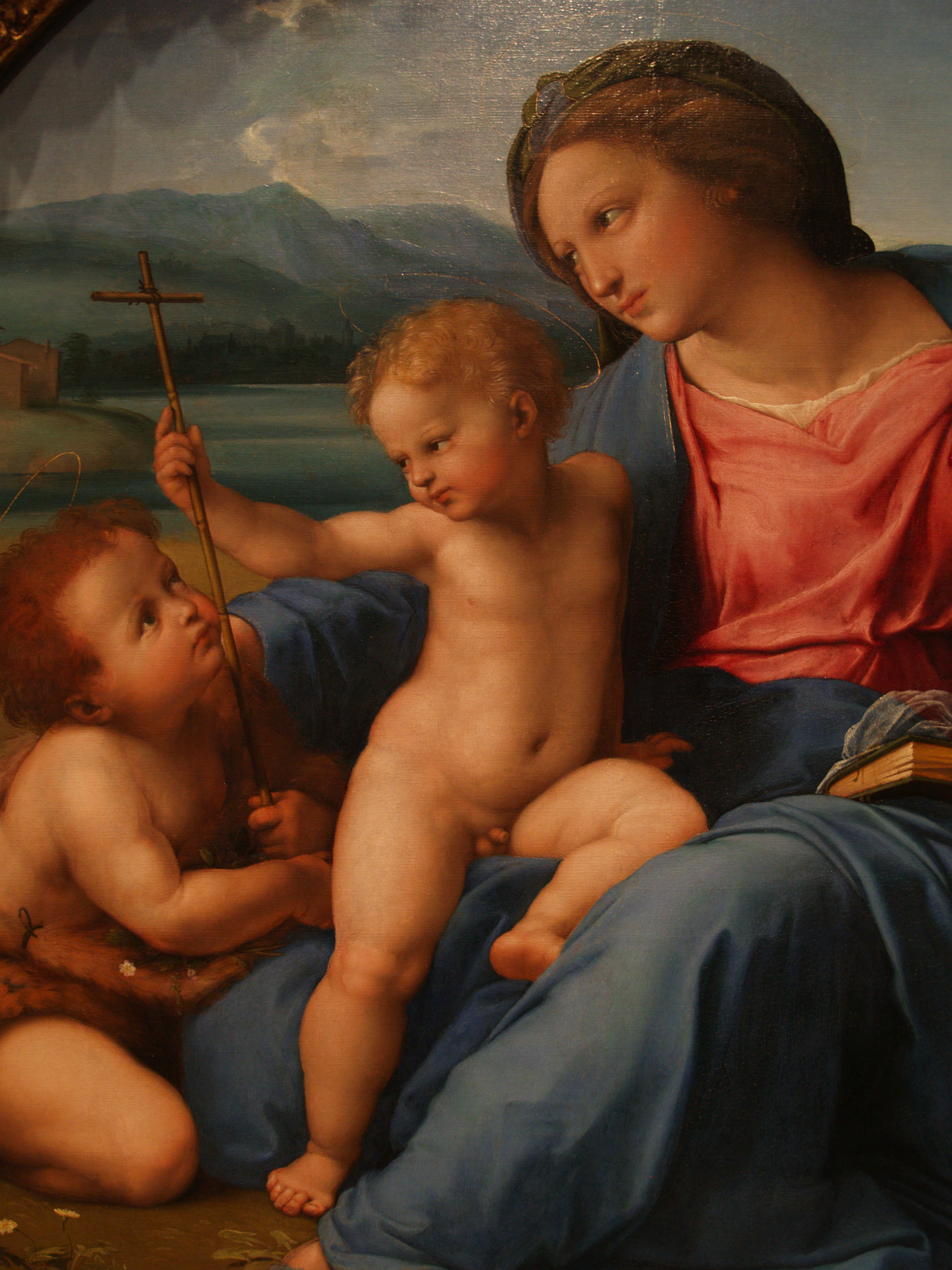 Rafael. Madonna de la casa de Alba. Washington, National Gallery.